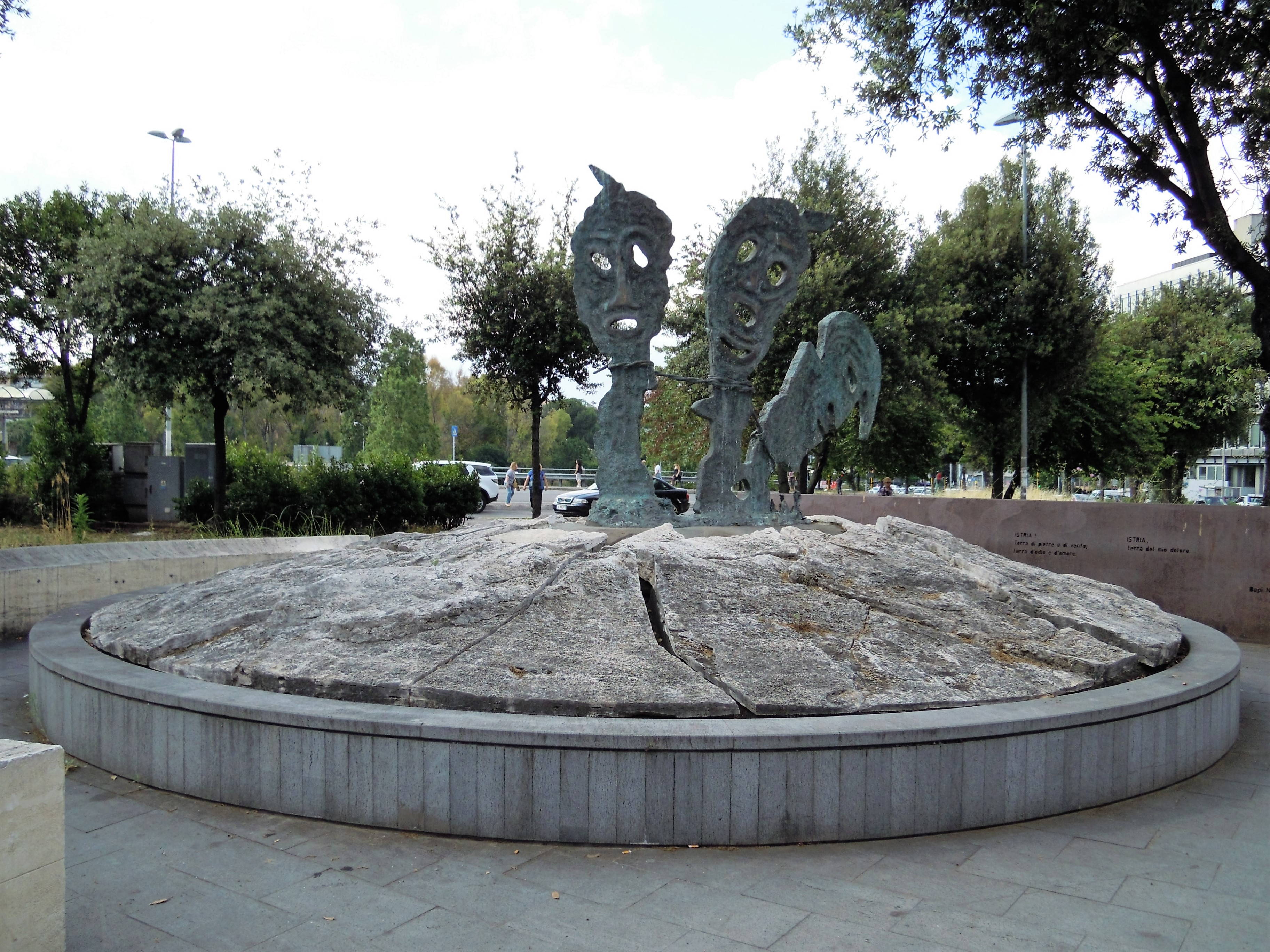 Roma, quartiere Giuliano-Dalmata: monumento alle vittime delle foibe (presso la stazione Laurentina della Metro B)